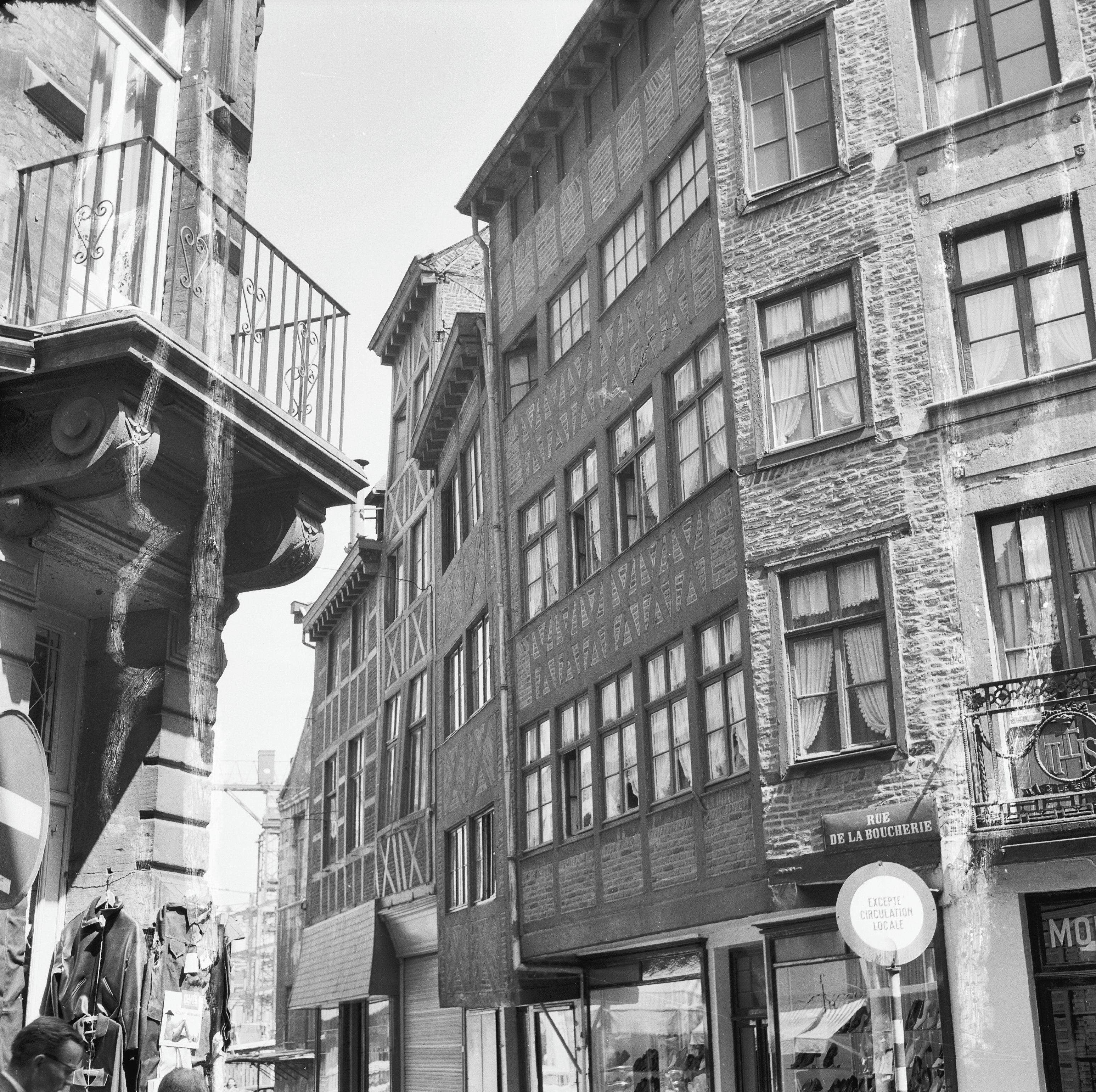 Diversen Straten: Rue de la Boucherie 2-4-6, overzicht